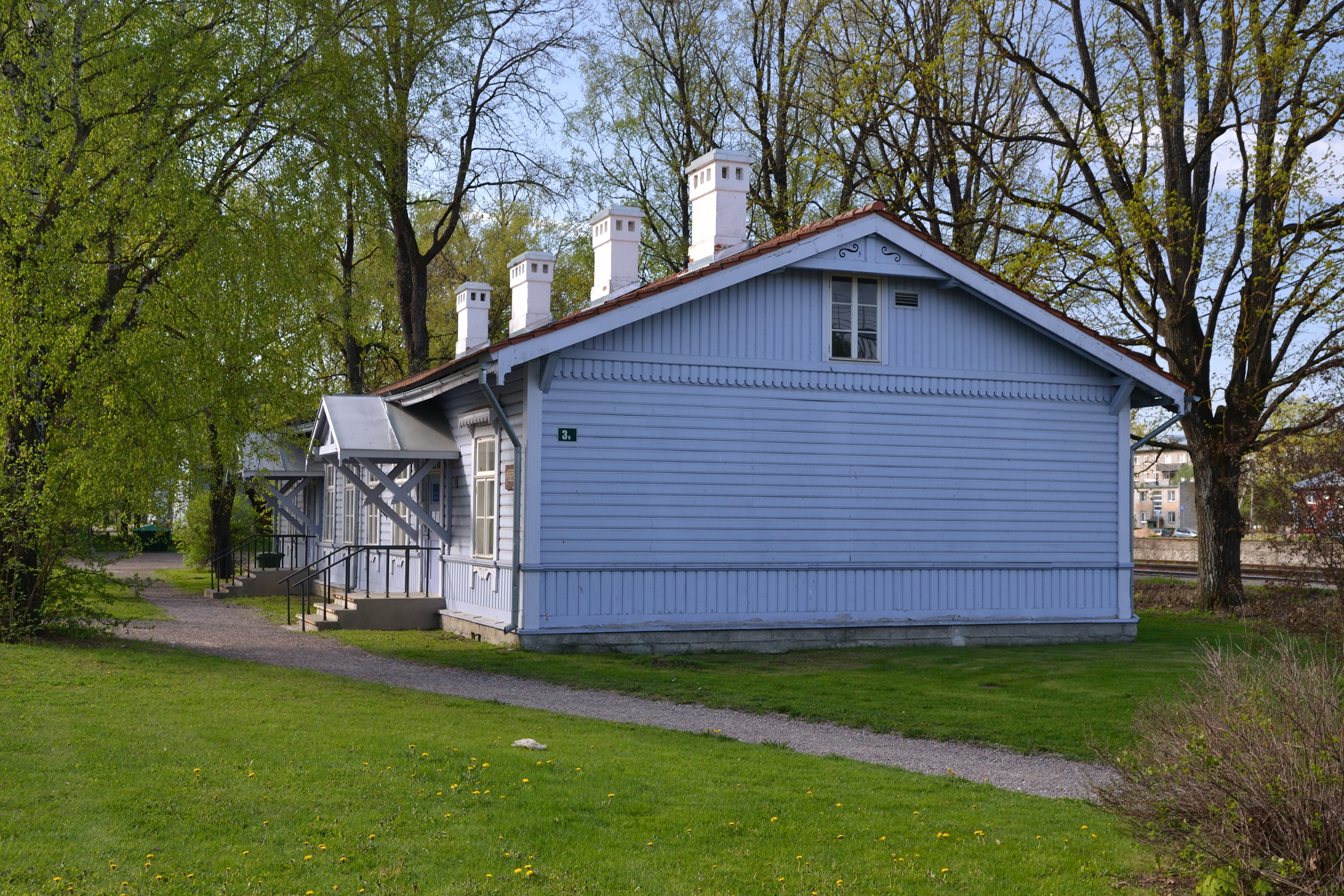 Betti Alveri sünnimaja Jõgevas